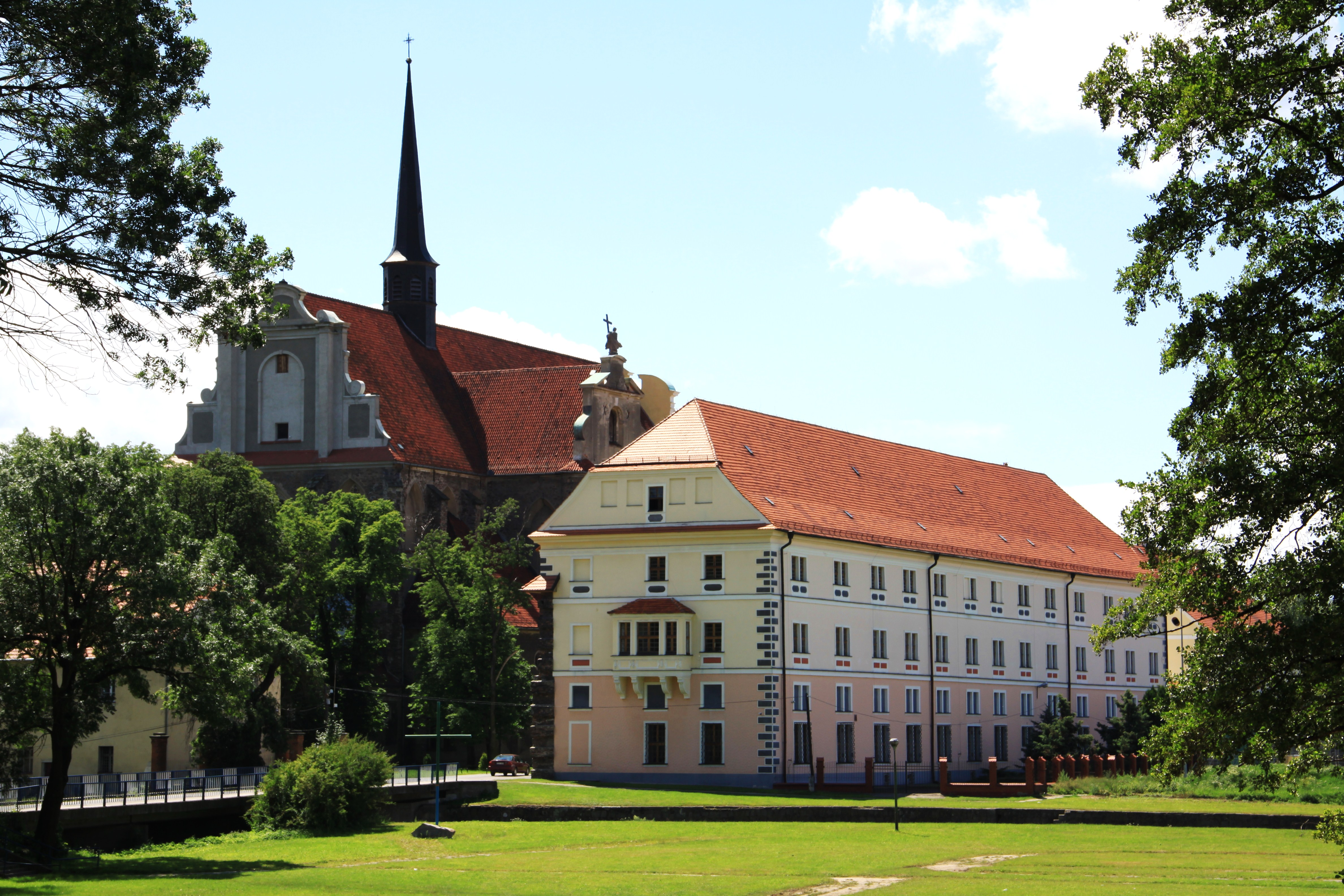 Kamieniec Ząbkowicki, klasztor - dom opata w zespole klasztoru cysterskiego, ob. Archiwum Państwowe, 1680